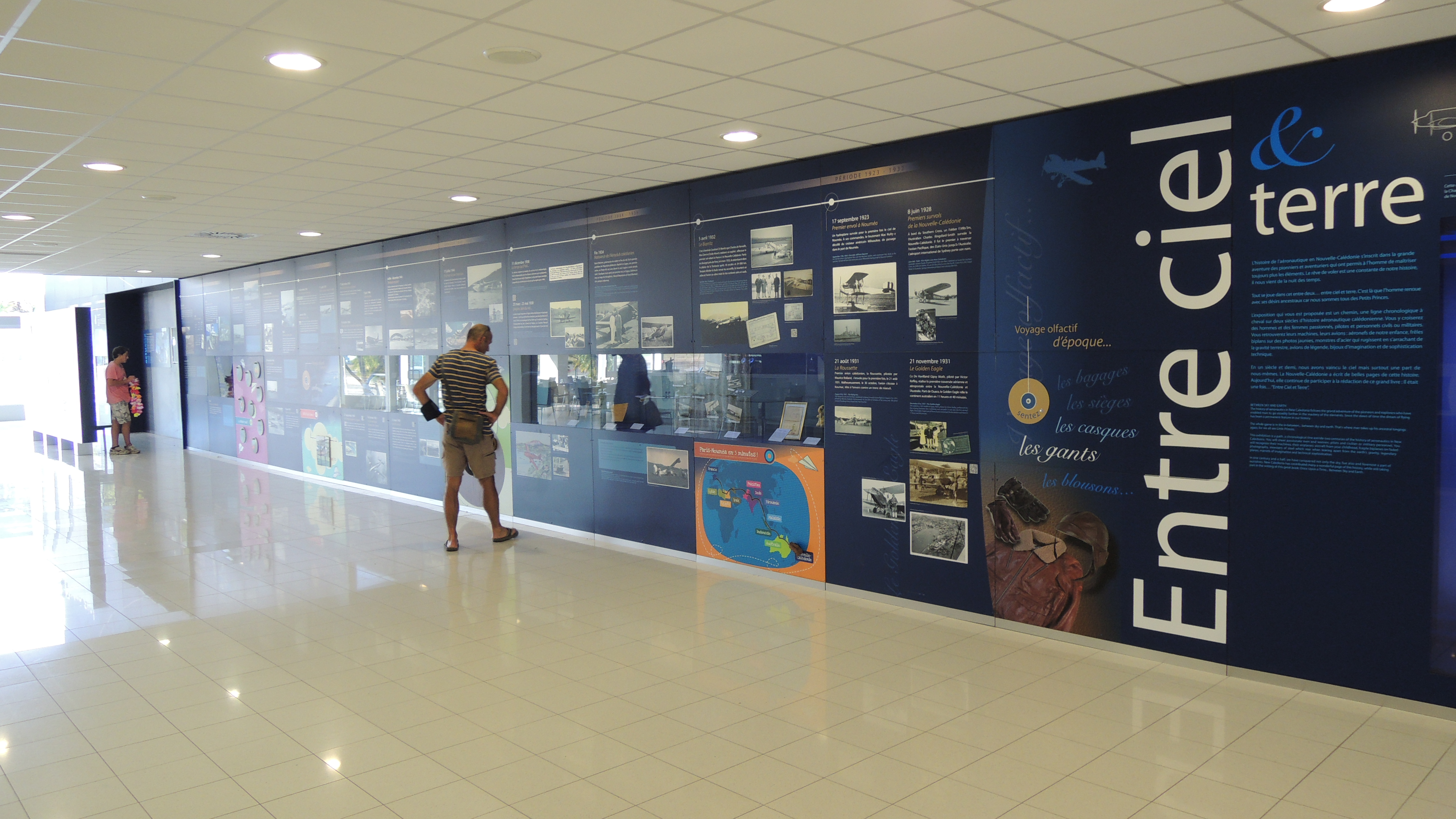 Exposition permanente retraçant l'histoire de l'aéroport : "Entre Ciel & Terre"